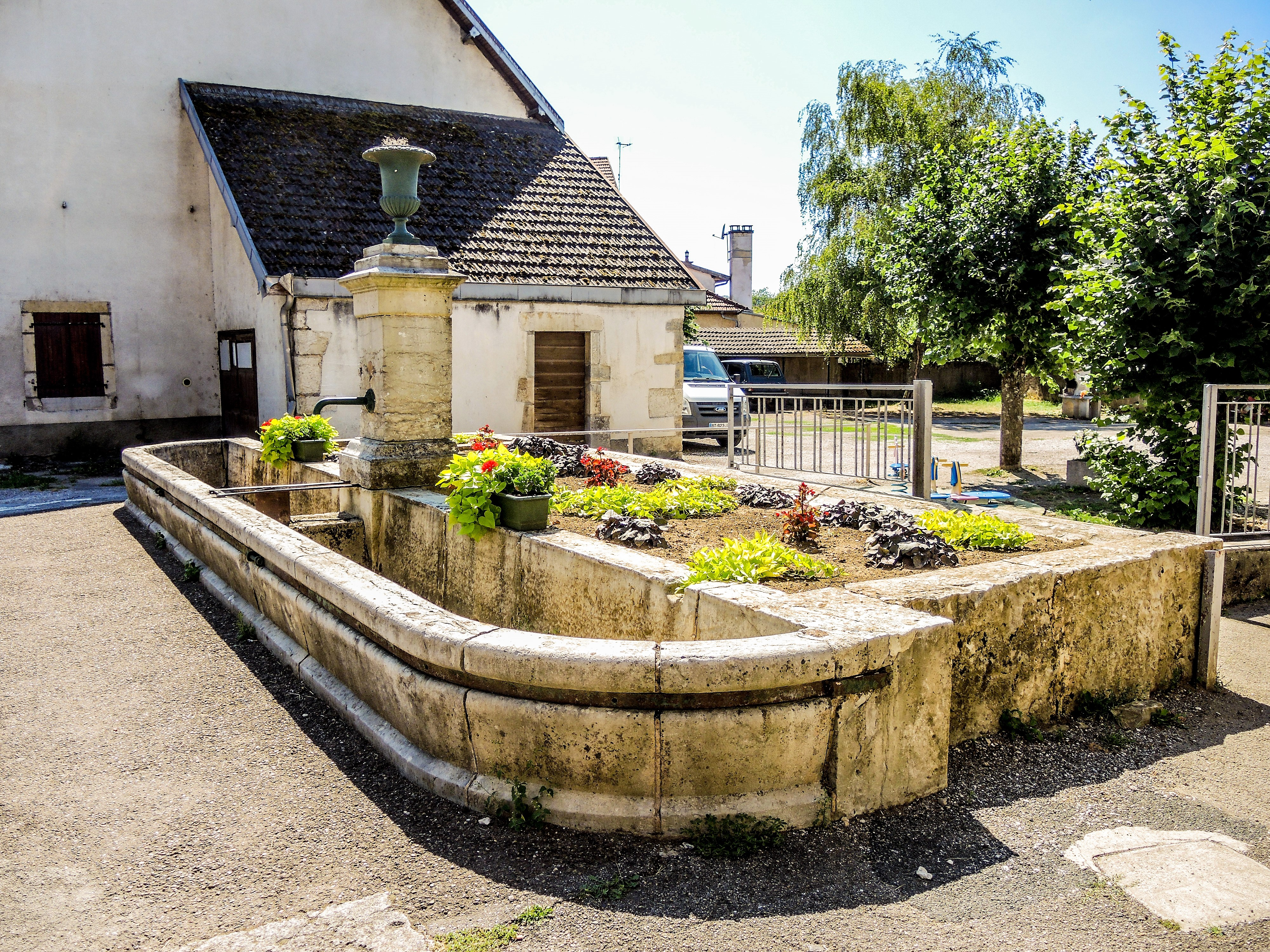 Fontaine-lavoir-abreuvoir. Chalèze. Doubs